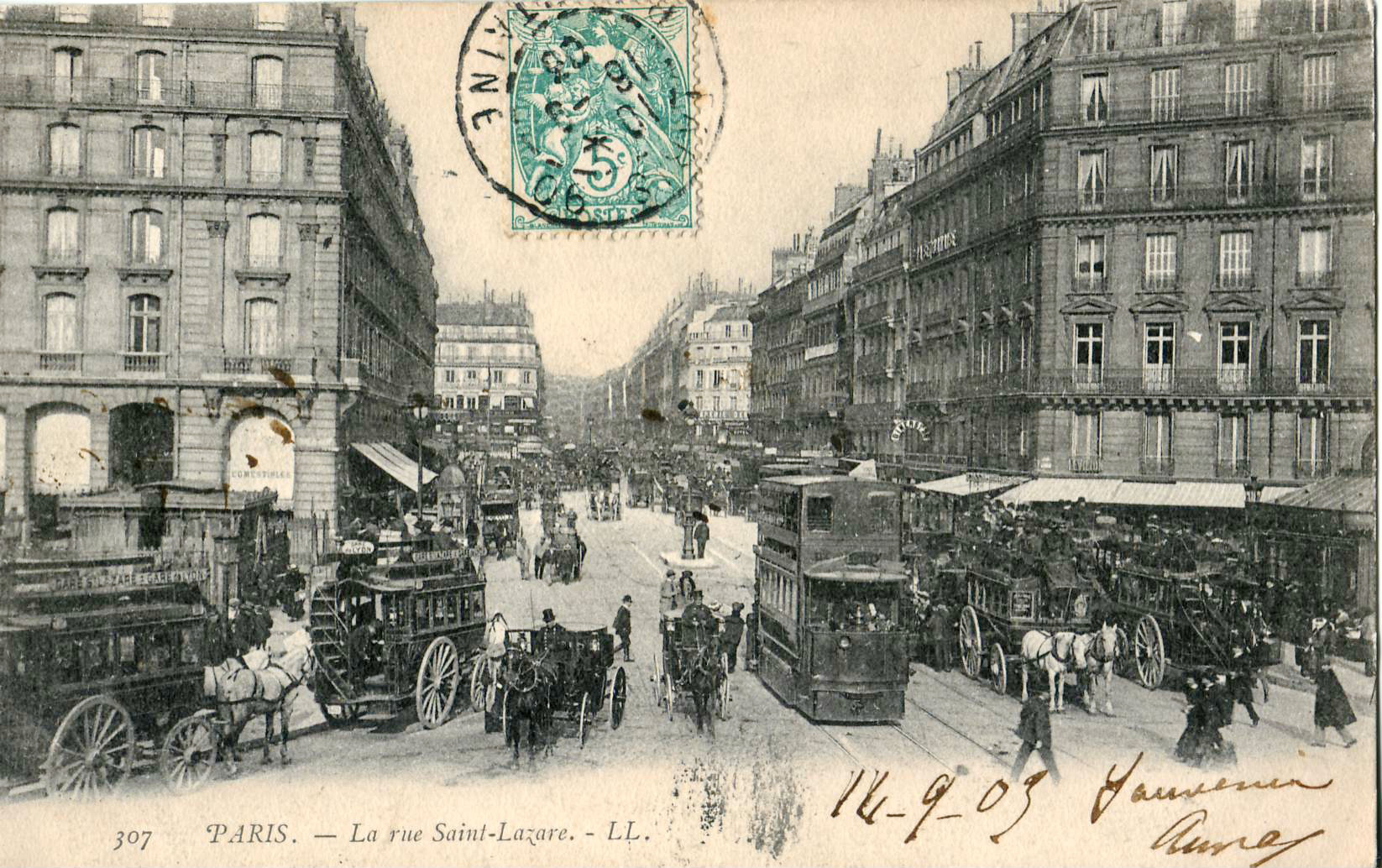 Carte postale ancienne éditée par LL, n°307 :PARIS - La rue Saint-Lazare